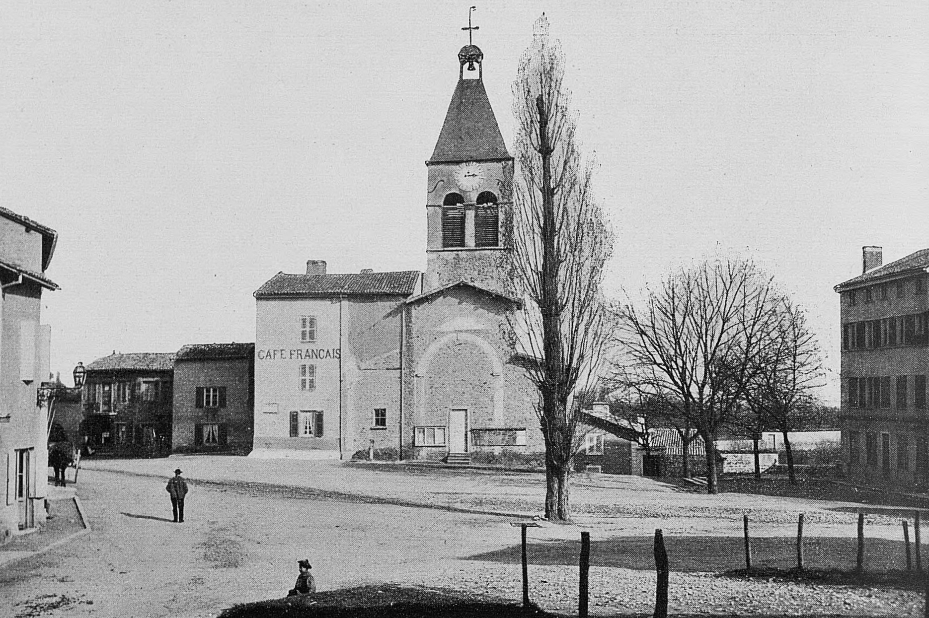 Dictionnaire illustré des communes du département du Rhône. Tome 1 / par MM. E. de Rolland et D. Clouzet.